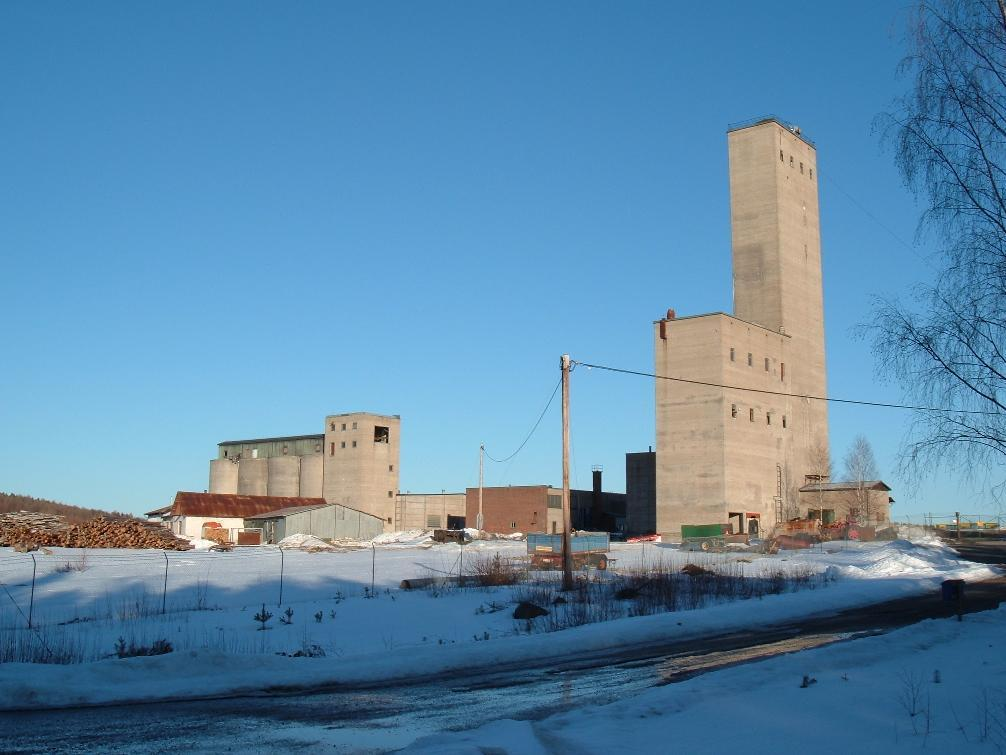 Bäckegruvan